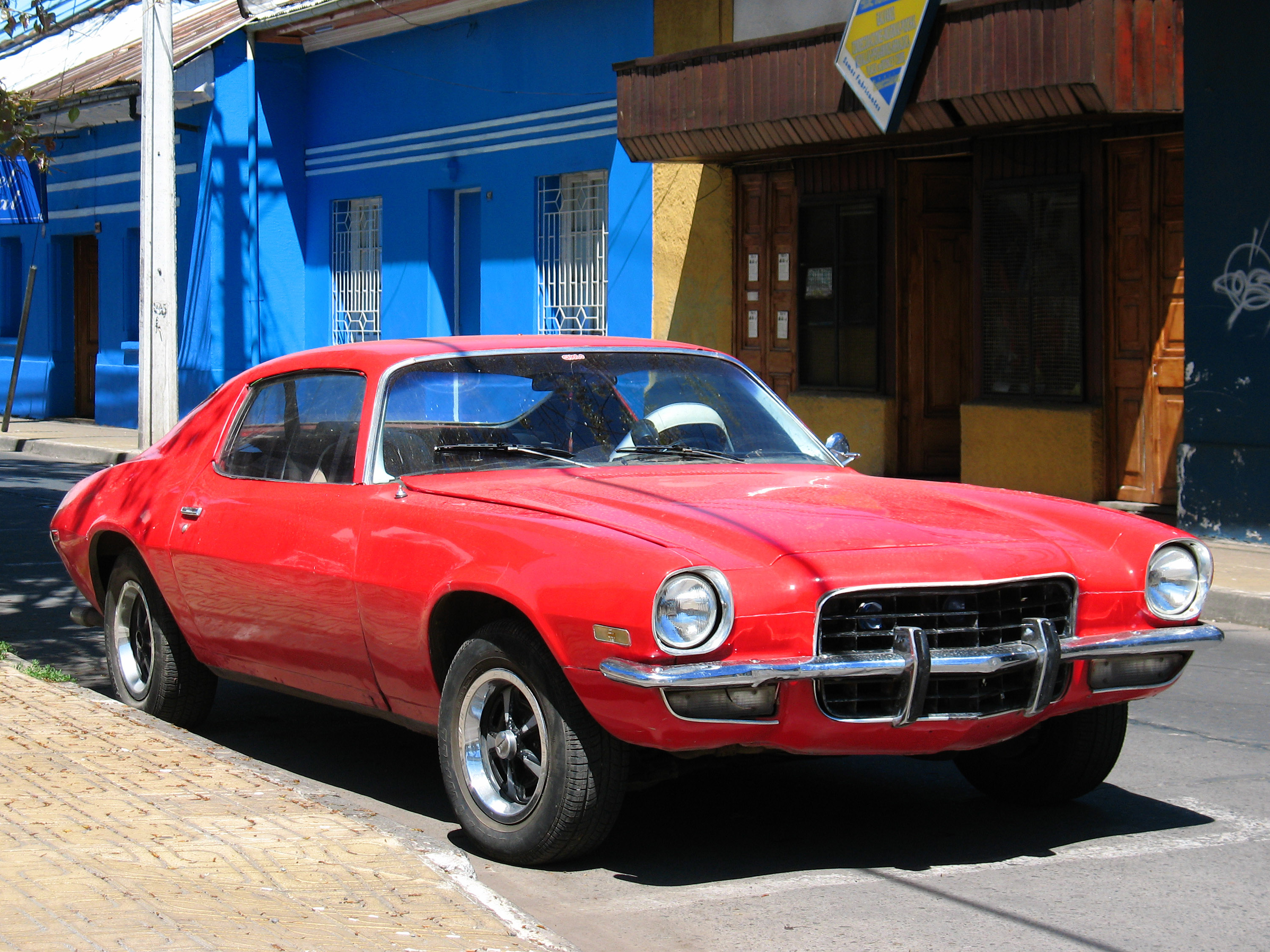 Chevrolet Camaro 1973